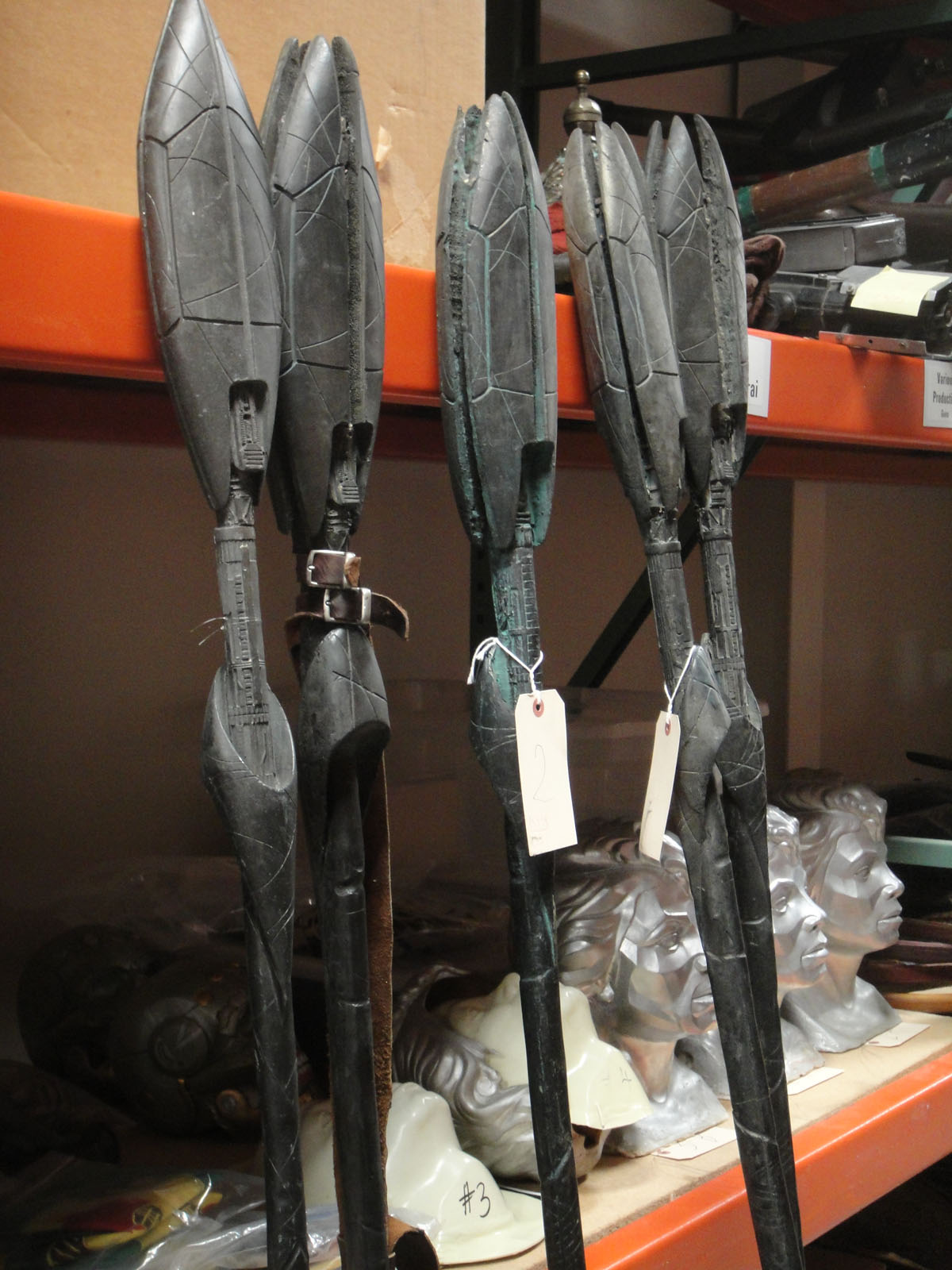 Lance des jaffas dans la franchise Stargate